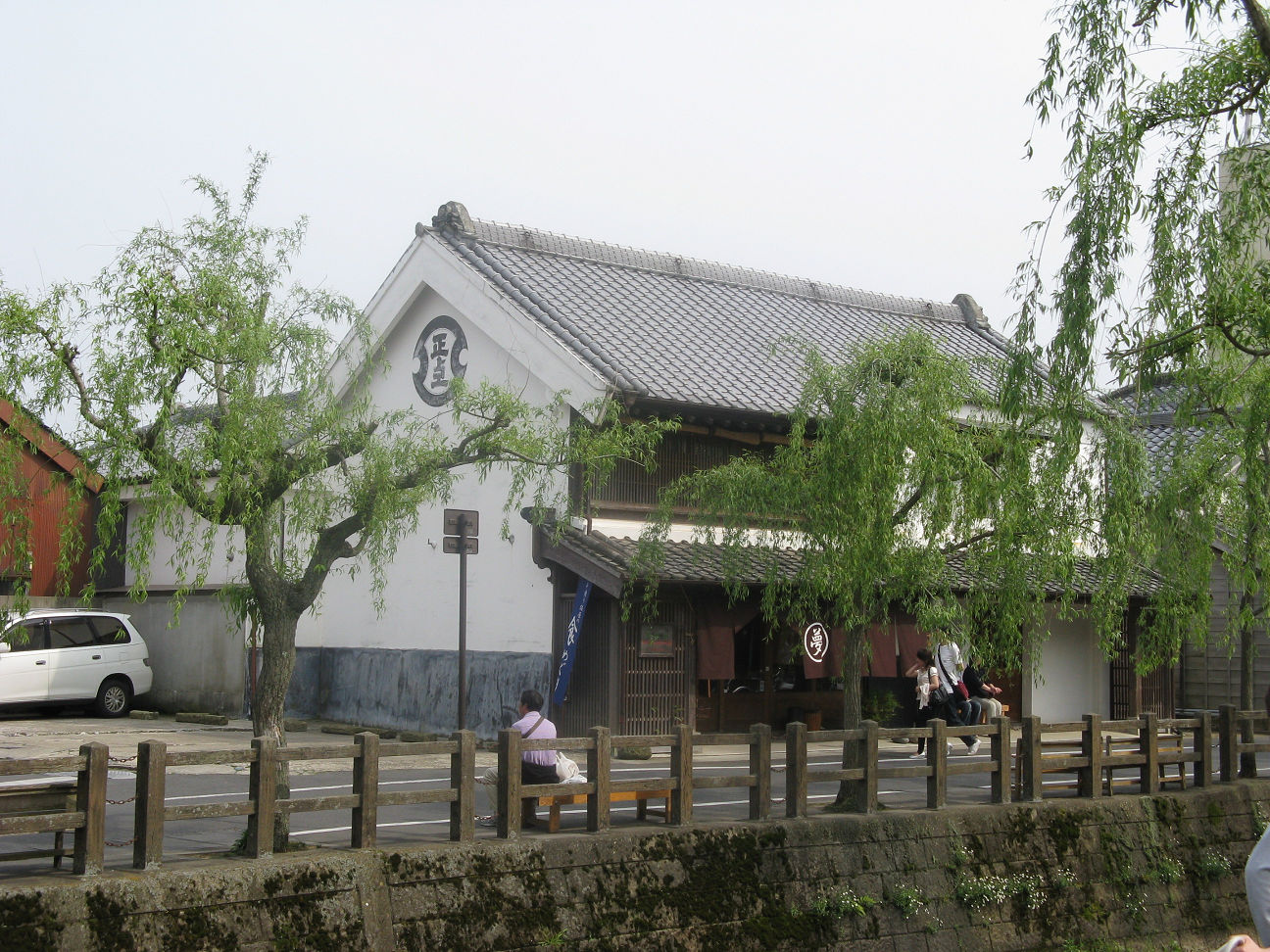 千葉県香取市 小野川沿いの店。